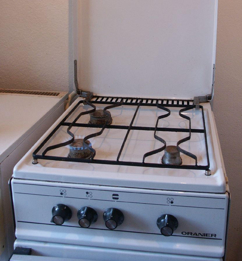 Gas stove